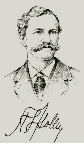 Ritratto di Alexander Lyman Holley (1832-1882)